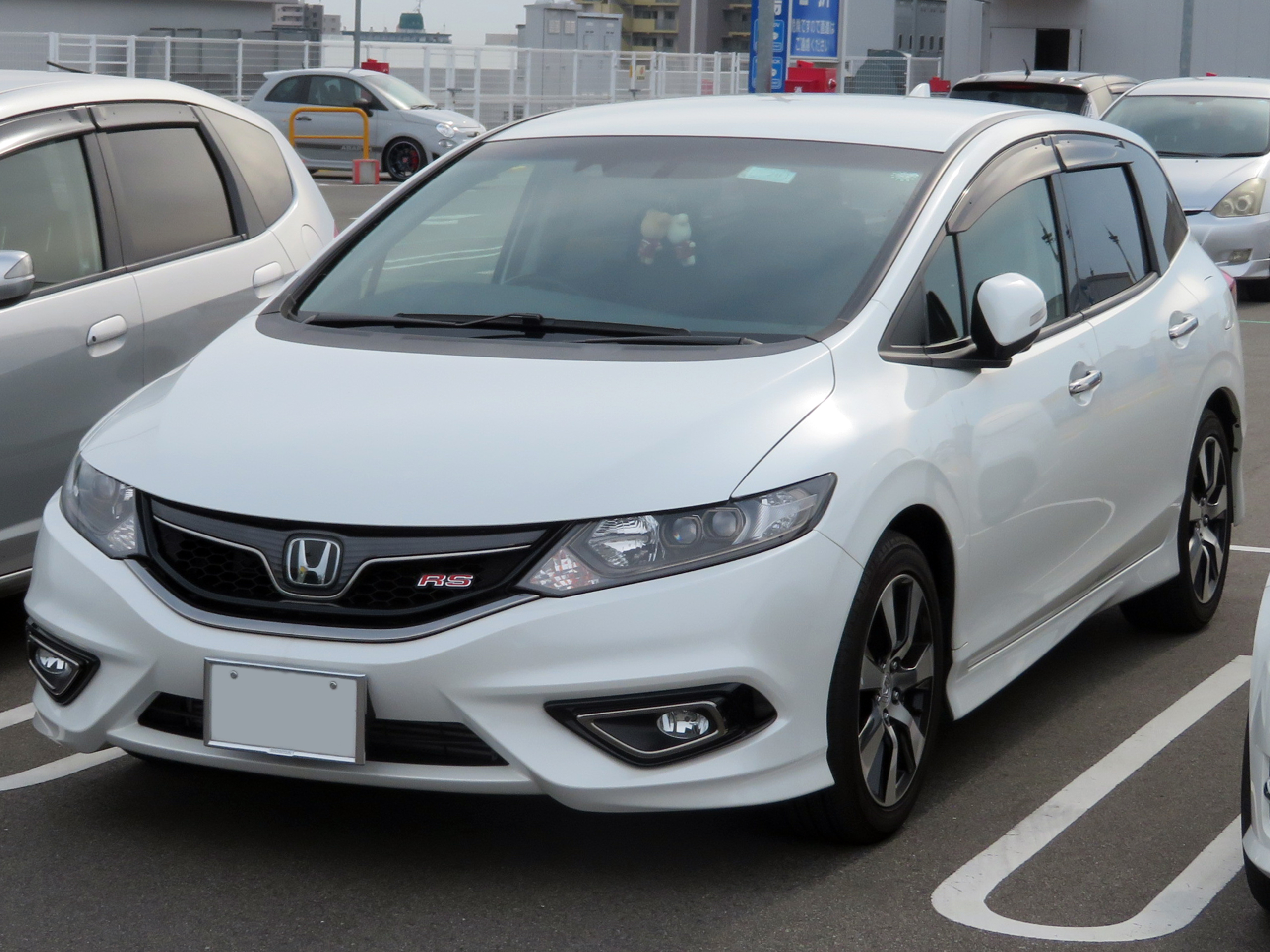 DBA-FR5型ホンダ・ジェイドRSをフロントから撮影。